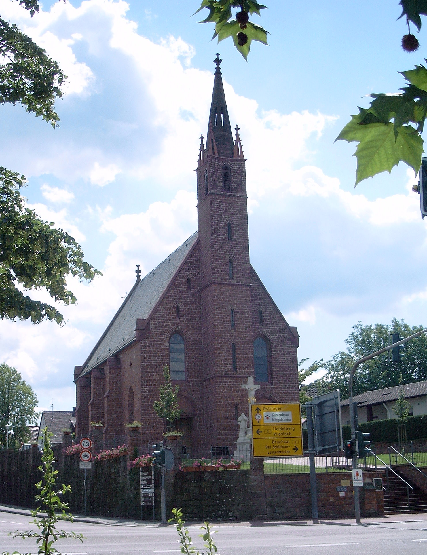 Rochuskirche Südseite